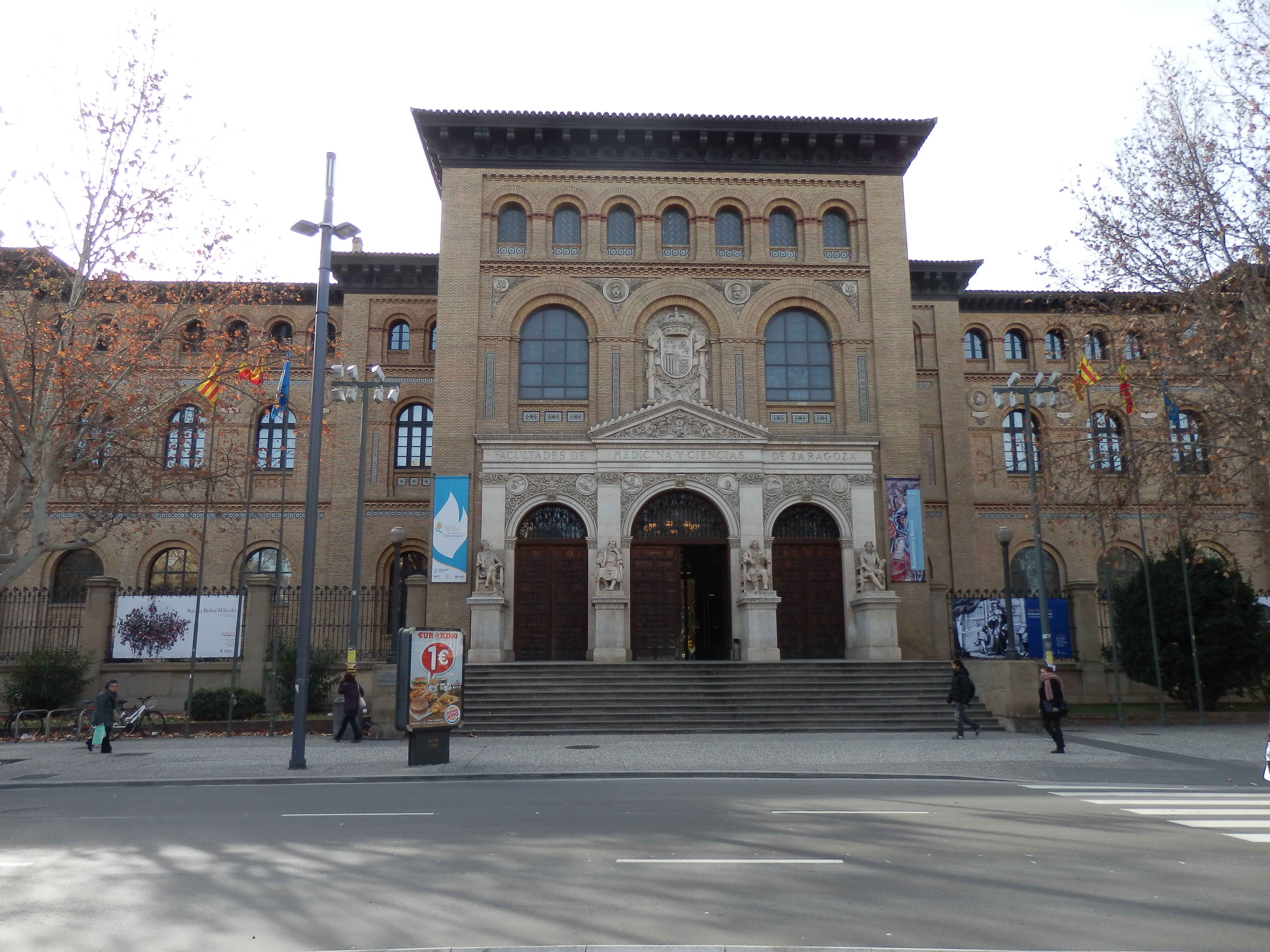 Paraninfo de la Universidad de Zaragoza. Antigua Facultad de Medicina de Zaragoza. Situado en la plaza Basilio Paraíso.